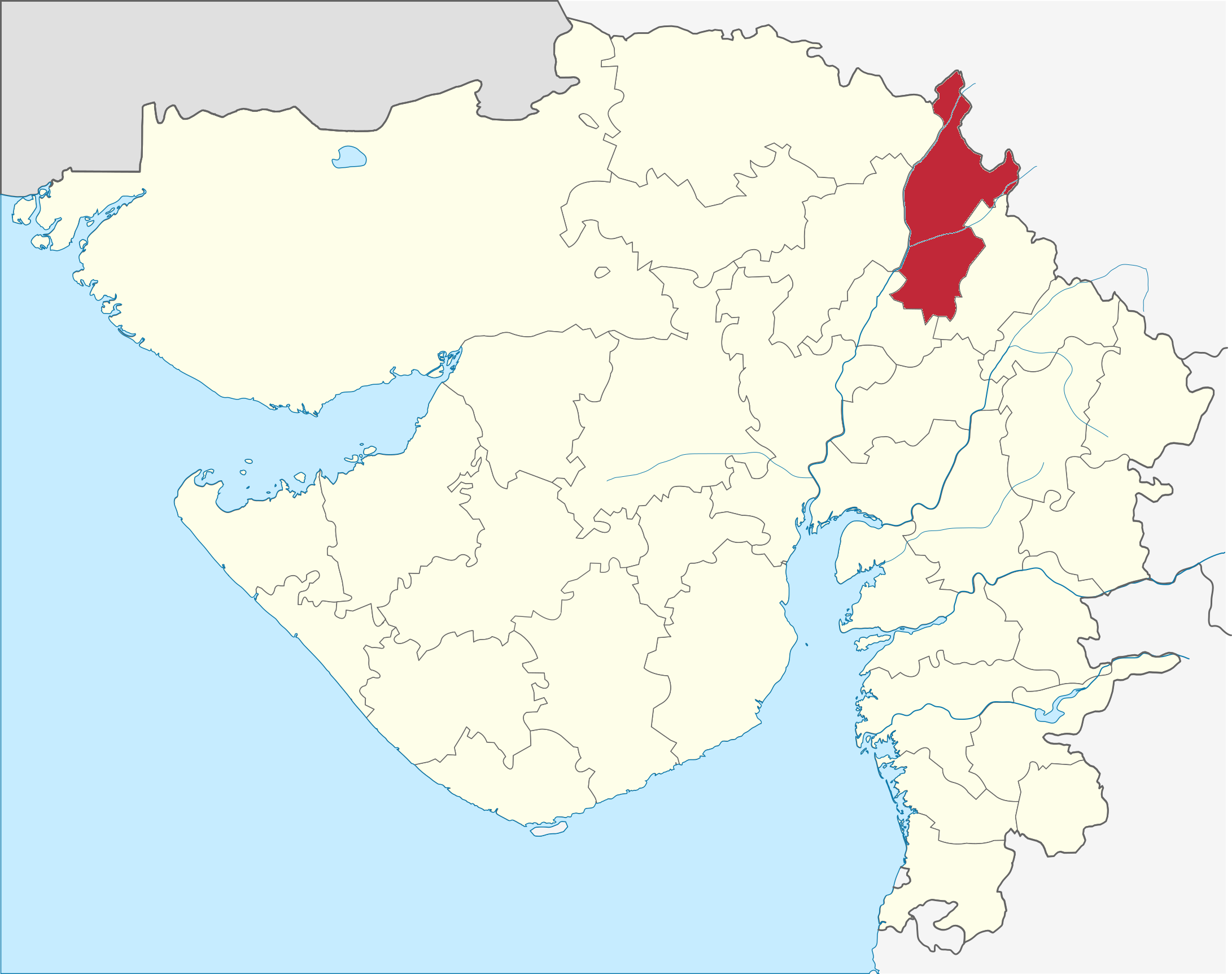 Distrito de Sabarkhanta en Gujarat